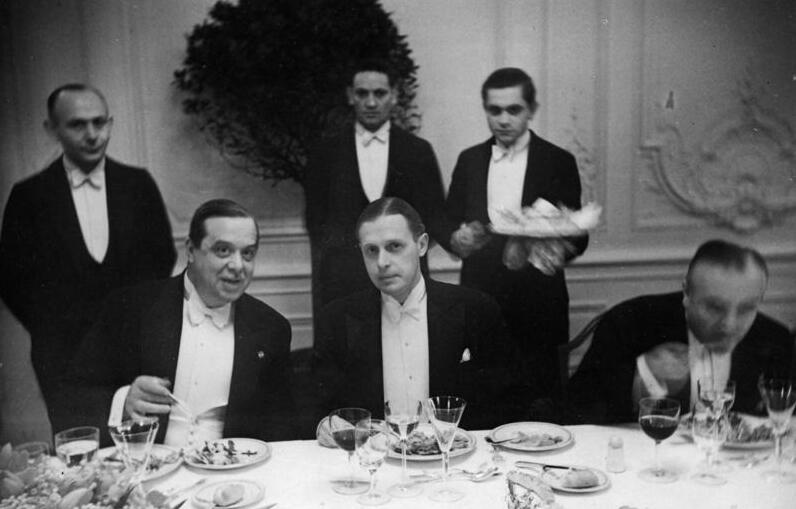 Berlin, Empfang im Hotel "Esplanade" Empfangsabend des italienischen Botschafters Orsini-Baroni im Hotel "Esplanade". Botschafter Orsini Baroni, Dr. Thomsen, Gutmann [von links] [Berlin.- Empfang des italienischen Botschafters Luca Orsini-Baroni im Hotel "Esplanade".] Abgebildete Personen: Orsini Baroni, Luca: Botschafter in Deutschland, Italien (GND 117147540) The depicted Gutmann is most likely Herbert M. Gutmann (GND 128787643)